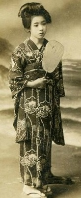 川端康成の婚約相手、伊藤初代。婚約の頃